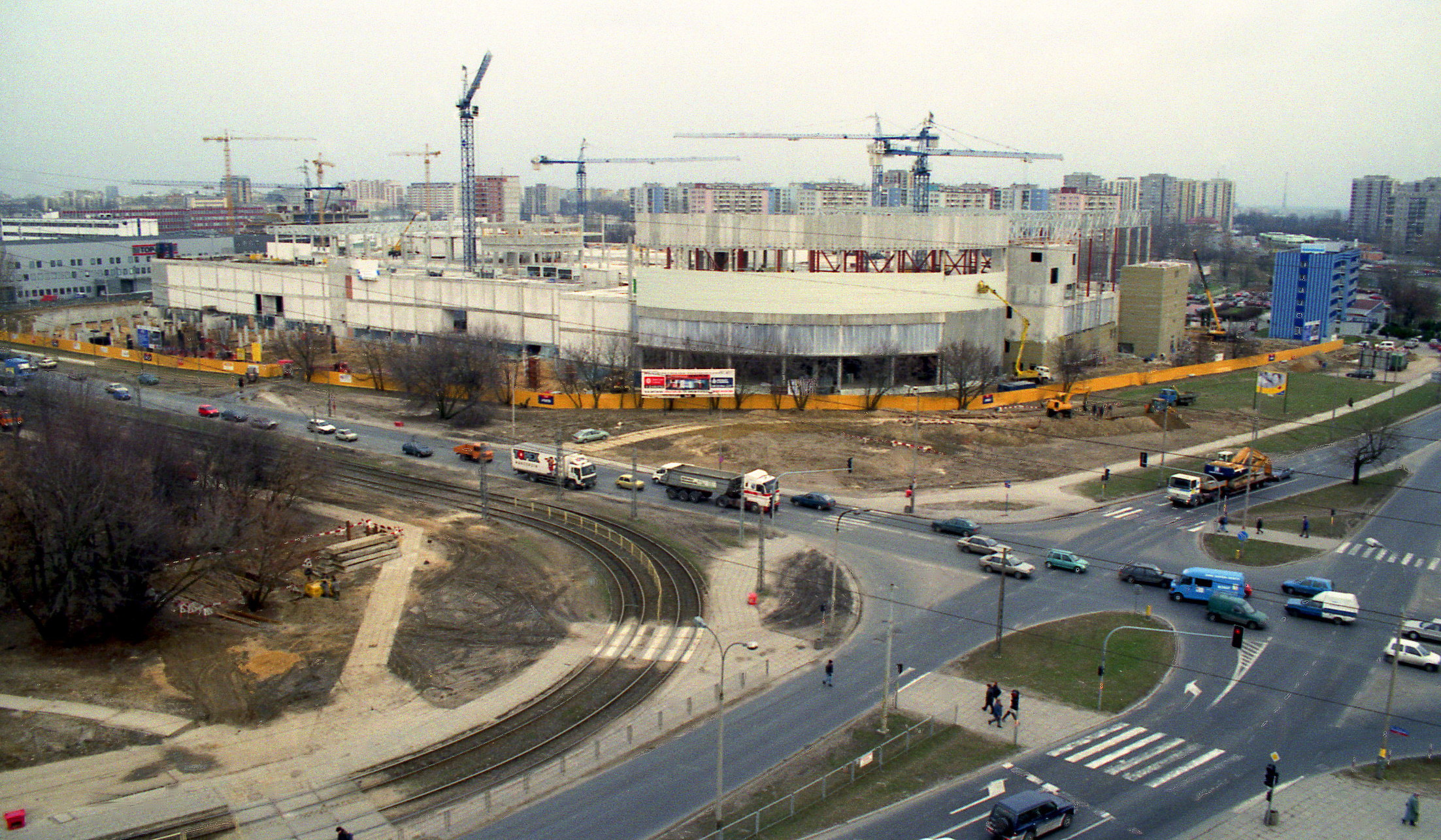 Budowa Galerii Mokotów